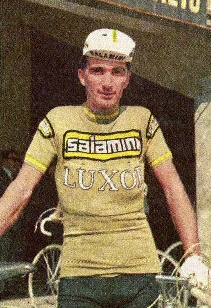 Figurina CAMPIONI dello SPORT 1967/68-n.230- PIETRO GUERRA